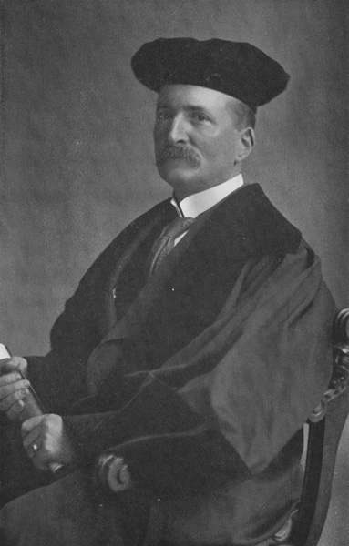 portretfoto van J.Ph. Vogel in hoogleraarskostuum, ca. 1914